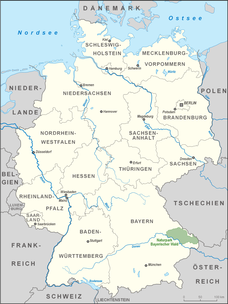 Karte des Naturparks Bayerischer Wald in Deutschland